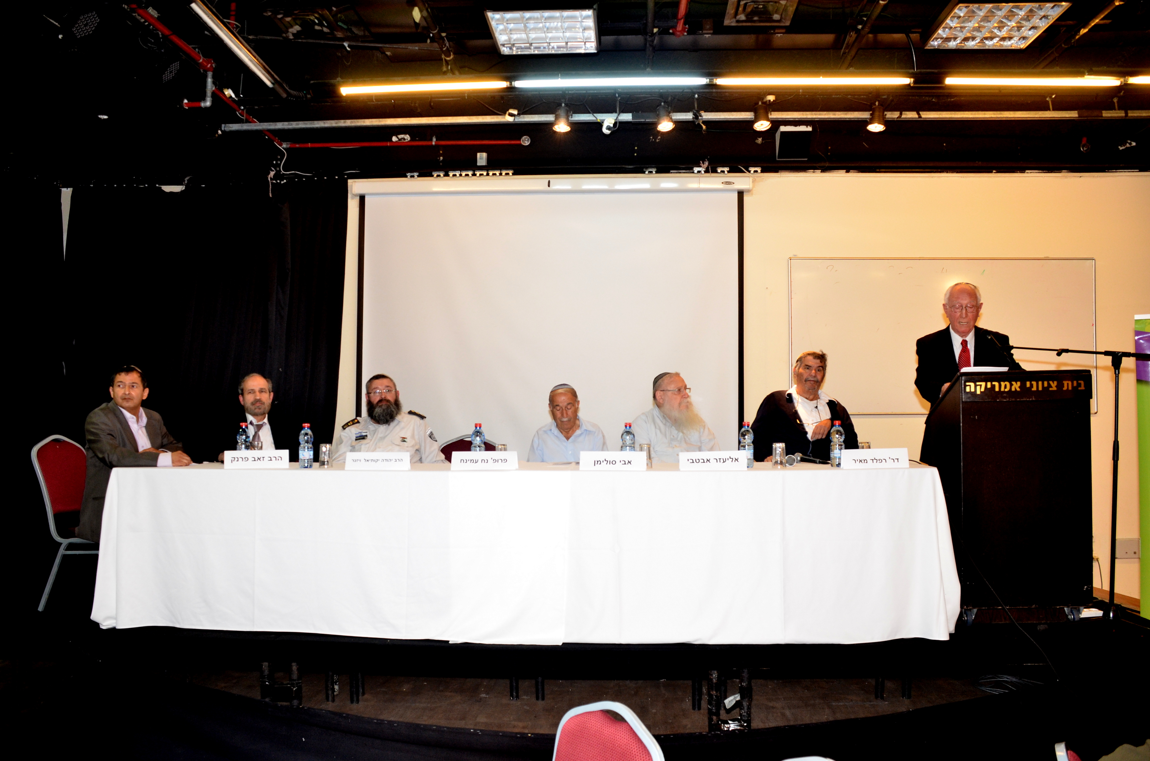 מימין לשמאל: פרופ' נח עמינח, ד"ר מאיר רפלד, הרב חיים דרוקמן, מר אליעזר אבטבי, הרב יהודה יקותיאל ויזנר, הרב זאב פרנק, מר אבי סולימן